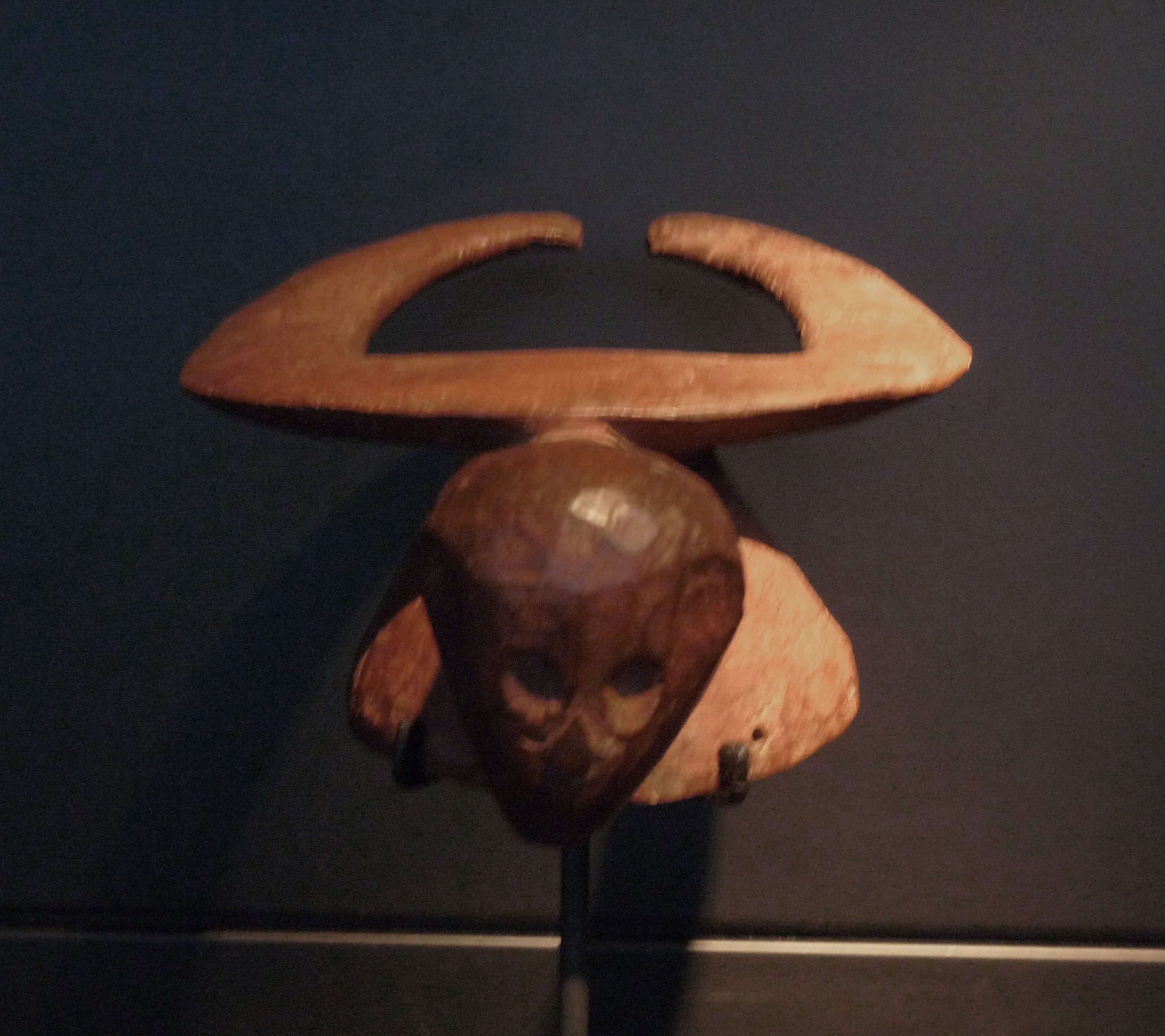 Masque-buffle nain ("petit" Mangam). Rindre. Milieu du XXe s. Bois, ocre. Exposition Nigeria. Arts de la vallée de la Bénoué au musée du quai Branly (Paris)